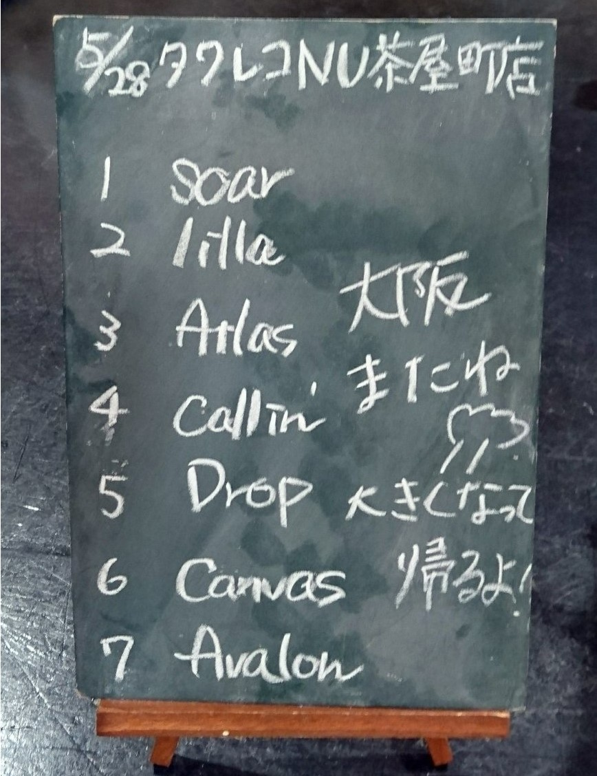 amiinAセトリボード(20170528(1))